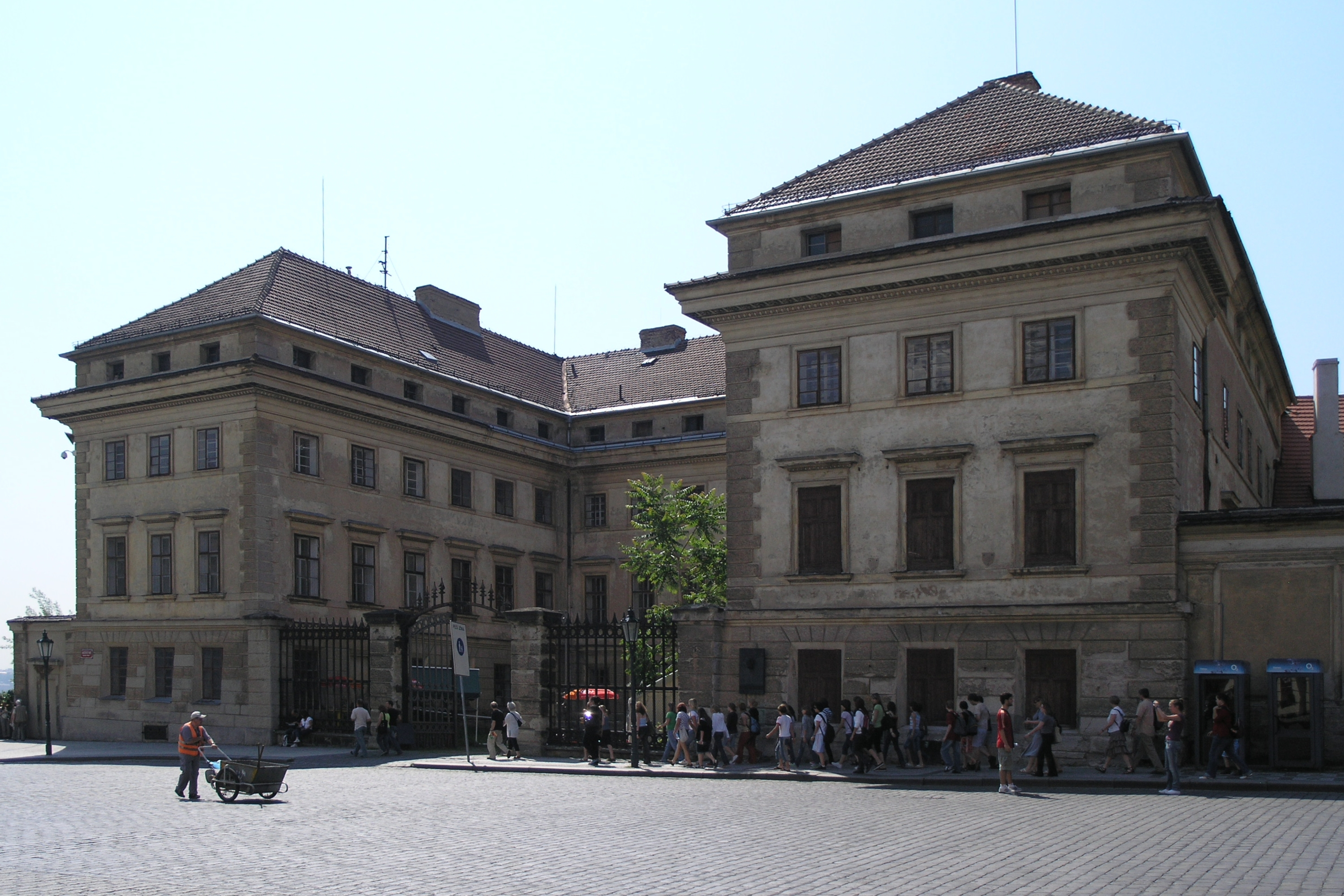 Praha, Hradčanské náměstí - Salmovský palác